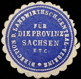 Sealing stamp Title: Direction des Landwirthschaftlichen Central-Vereins für die Provinz Sachsen etc. Description: Landwirtschaft, blau, weiß, geprägt Place: Magdeburg size: 3 cm